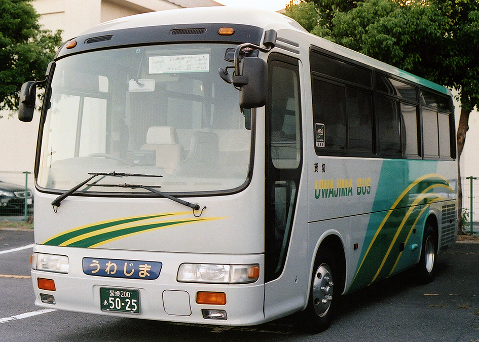 宇和島自動車 いすゞ・ジャーニーJ PB-RX6JFAJ